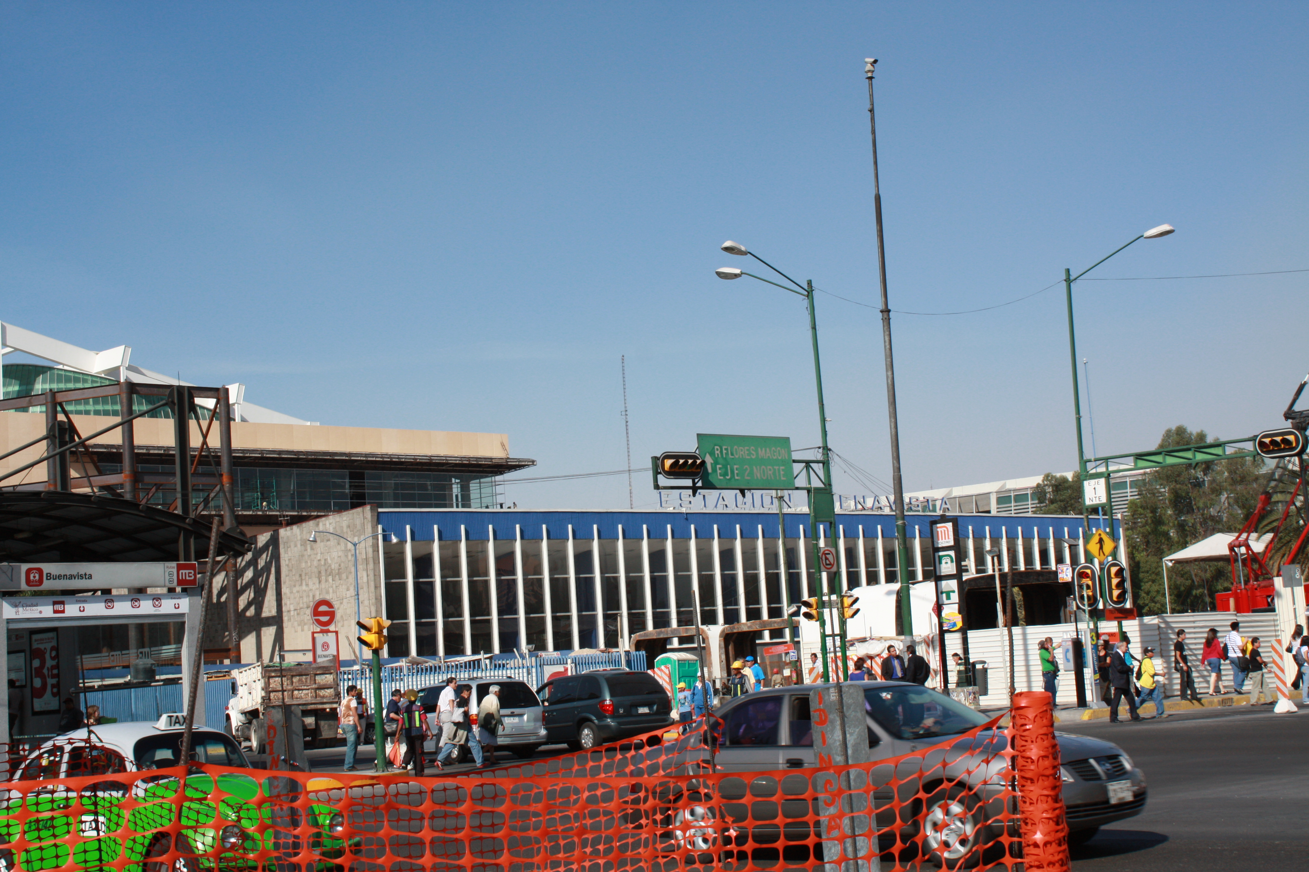 Estacion Buenavista en reparacion